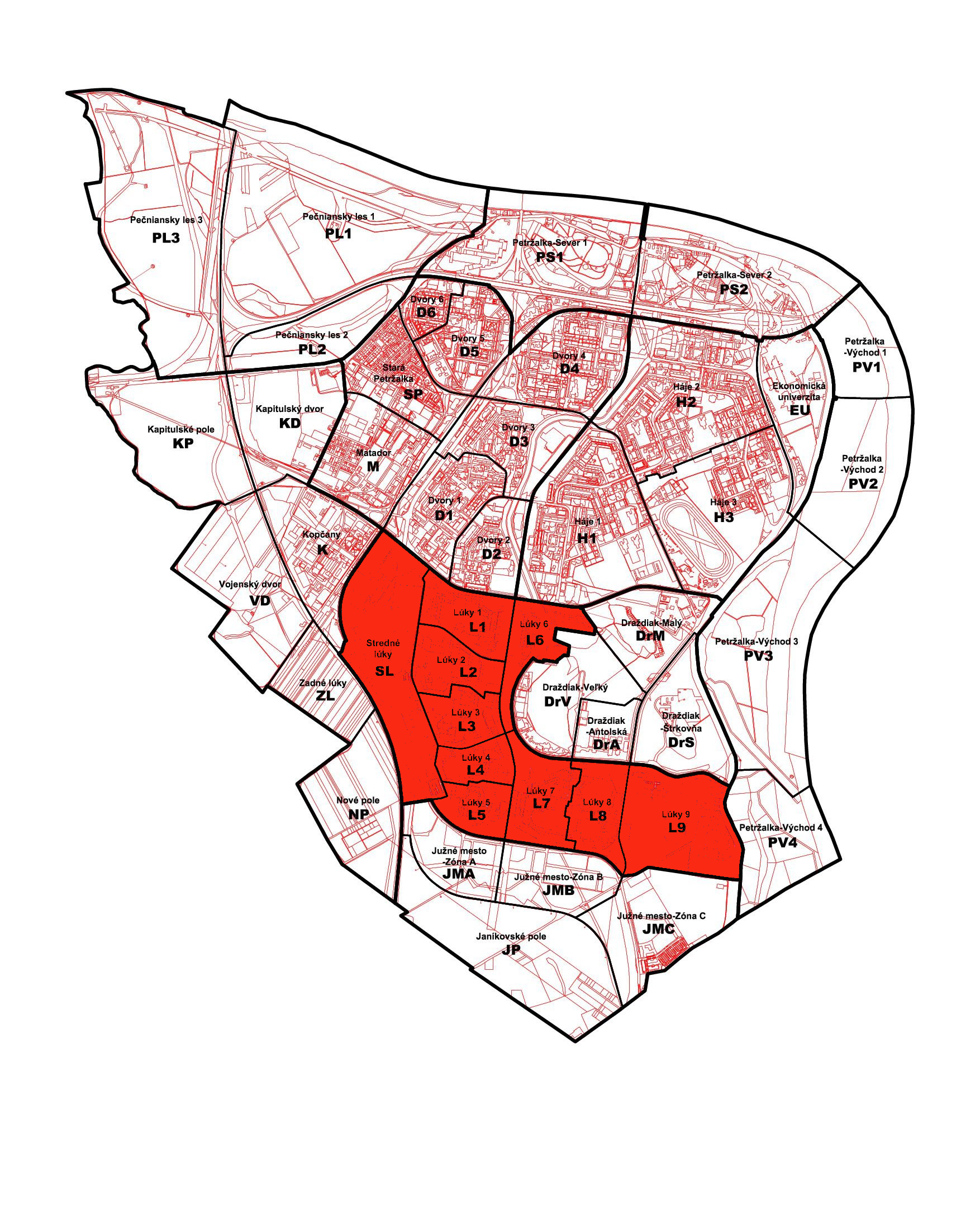 Poloha miestnej časti Petržalky